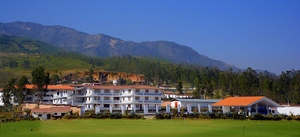 Campus Universitarios